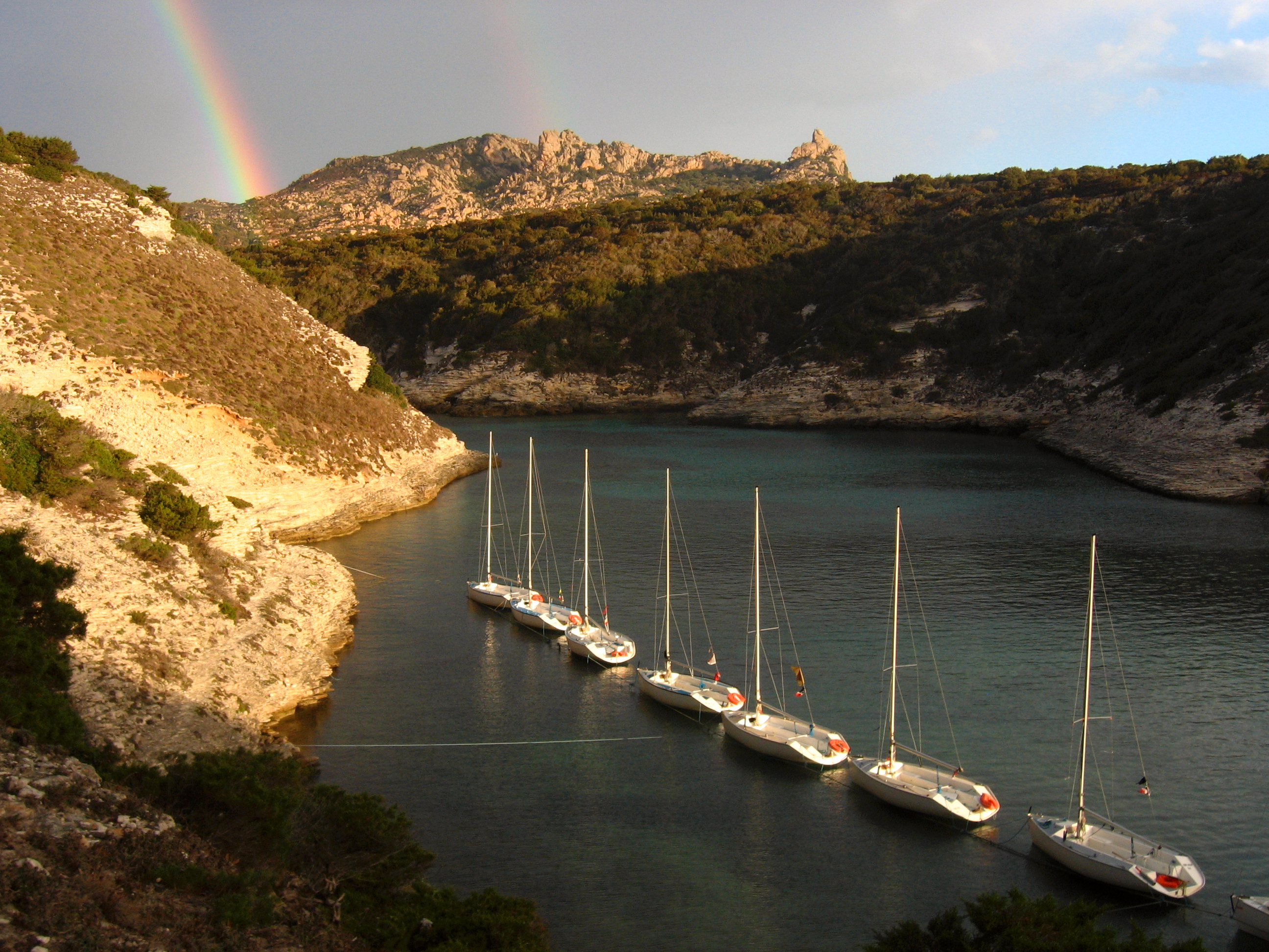 Bootstyp Glénans 5.7 unter einem morgendlichen Regenbogen; Fazzio, Korsika